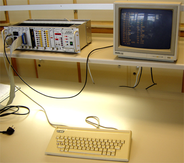 Dëst Bild weist e Mikrocomputer, dee benotzt gëtt, fir en Assembler (Informatik) a Maschinesprooch ëmzewandelen.